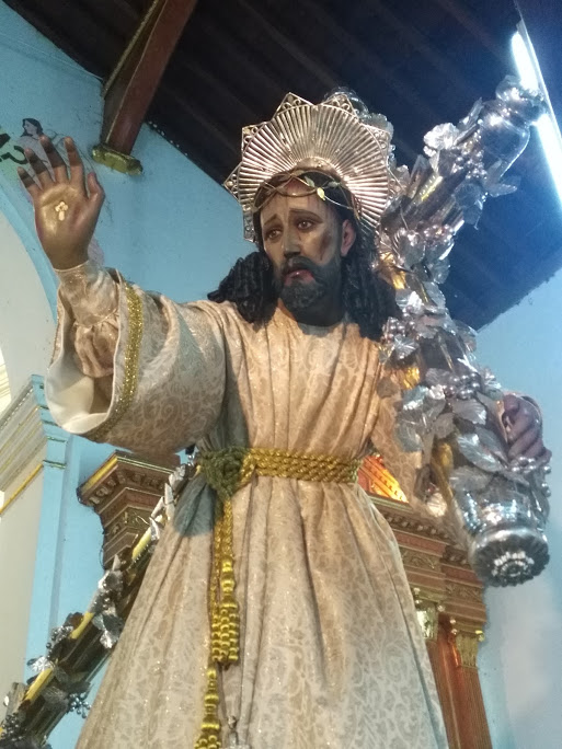 Señor de la Reseña, San Felipe, León, Nicaragua